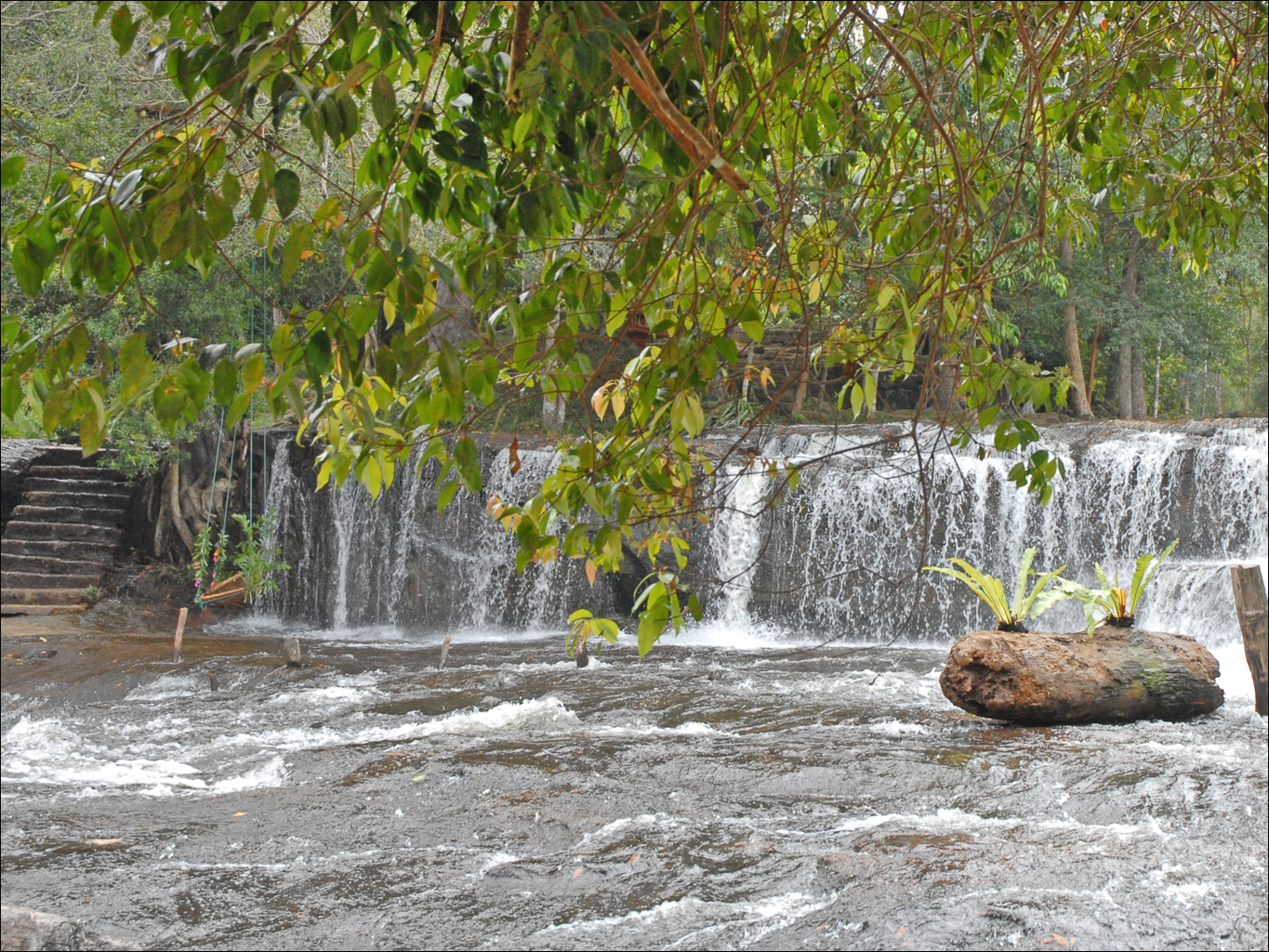 Le Phnom Kulen est la montagne sacrée des khmers. Elle est située à 50 Km de Siem Reap et domine la plaine où se trouvent les grands temples. Les rivières, qui coulent à Angkor, prennent leurs sources dans cette montagne. C'est dans ce site naturel, très étendu et facilement défendable, qu'est né le royaume khmer en 802 proclamé par le Roi Jayavarman II qui a rendu son pays indépendant de la tutelle de Java. Au sommet de la montagne, une petite pagode construite au sommet d'un rocher (487 m) abrite un Bouddha couché, qui est devenu un lieu de pèlerinage pour les Cambodgiens. D'anciens temples khmers en ruine datant du IXème siècle sont visibles au bord de la rivière qui prend sa source.à proximité. Dans le lit de la rivière, à proximité de la source, les anciens khmers ont sculpté des Linga (représentations symboliques de Shiva) et des figures de Vishnou allongé sur le serpent Ananta. C'est en coulant sur les Linga que l'eau devient sacrée. Ce site, qui est classé parc naturel, comprend plusieurs cascades et des espaces de détente qui sont fréquentés par les Cambodgiens durant leurs loisirs. Une route privée en très mauvais état mais payante pour les étrangers permet d'accéder au plateau, il est recommandé de ne pas sortir des sentiers car le territoire n'a pas été complètement déminé. Hors des circuits touristiques en raison de sa distance aux hôtels de Siem Reap et des difficultés d'accès, Phnom Kulen est très peu visité par les étrangers et ne figure pas dans la plupart des guides sur le Cambodge alors qu'il est classé au patrimoine mondial. Article Wikipedia sur le Phnom Kulen